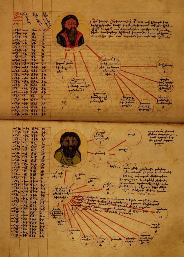 Страница из рукописи «Летописи» Аветика Багдасаряна